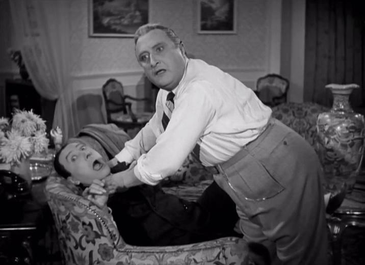 Scena del film L'innocente Casimiro (1945)